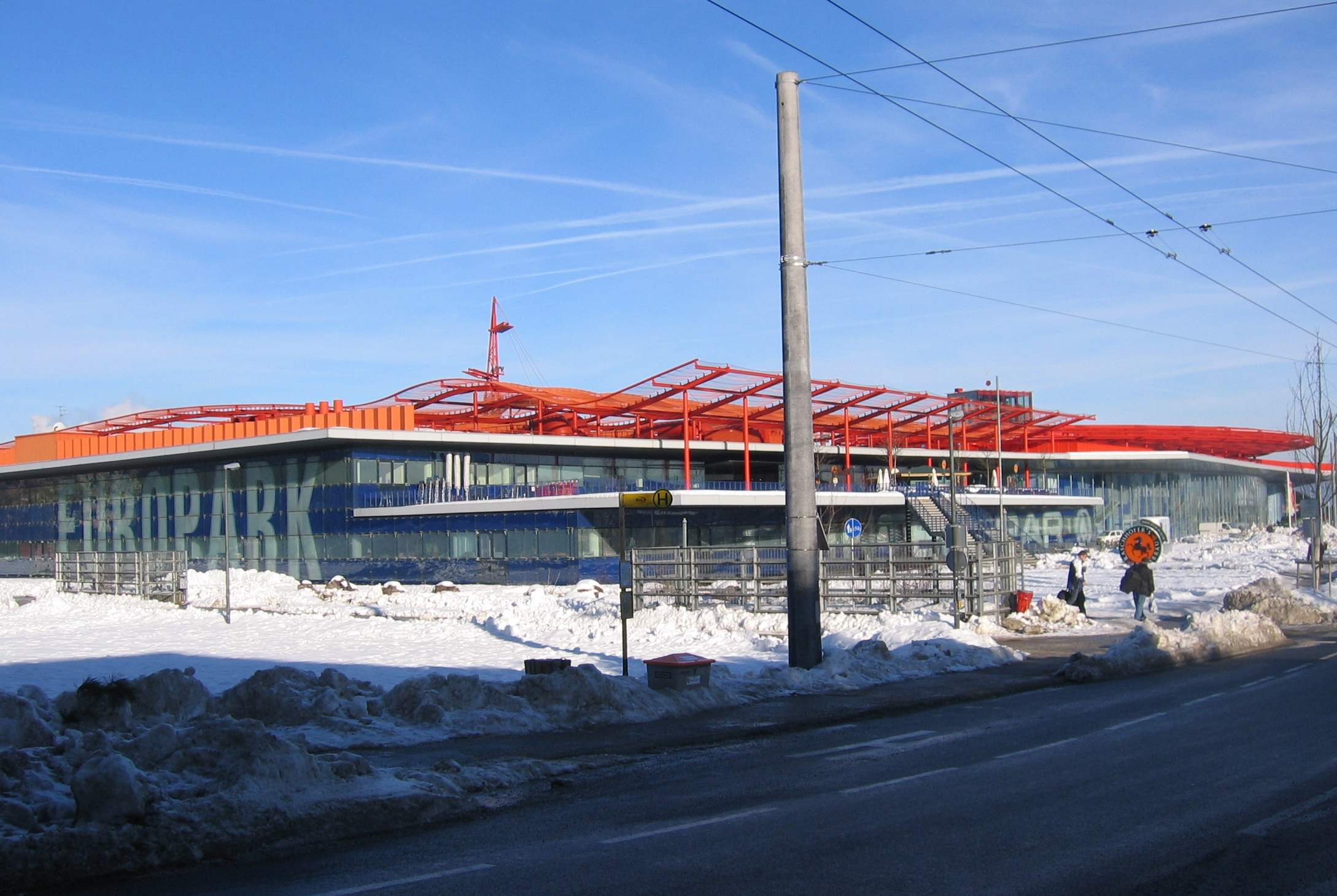 'Europark' shopping mall (Salzburg) Photograph by Gakuro 06